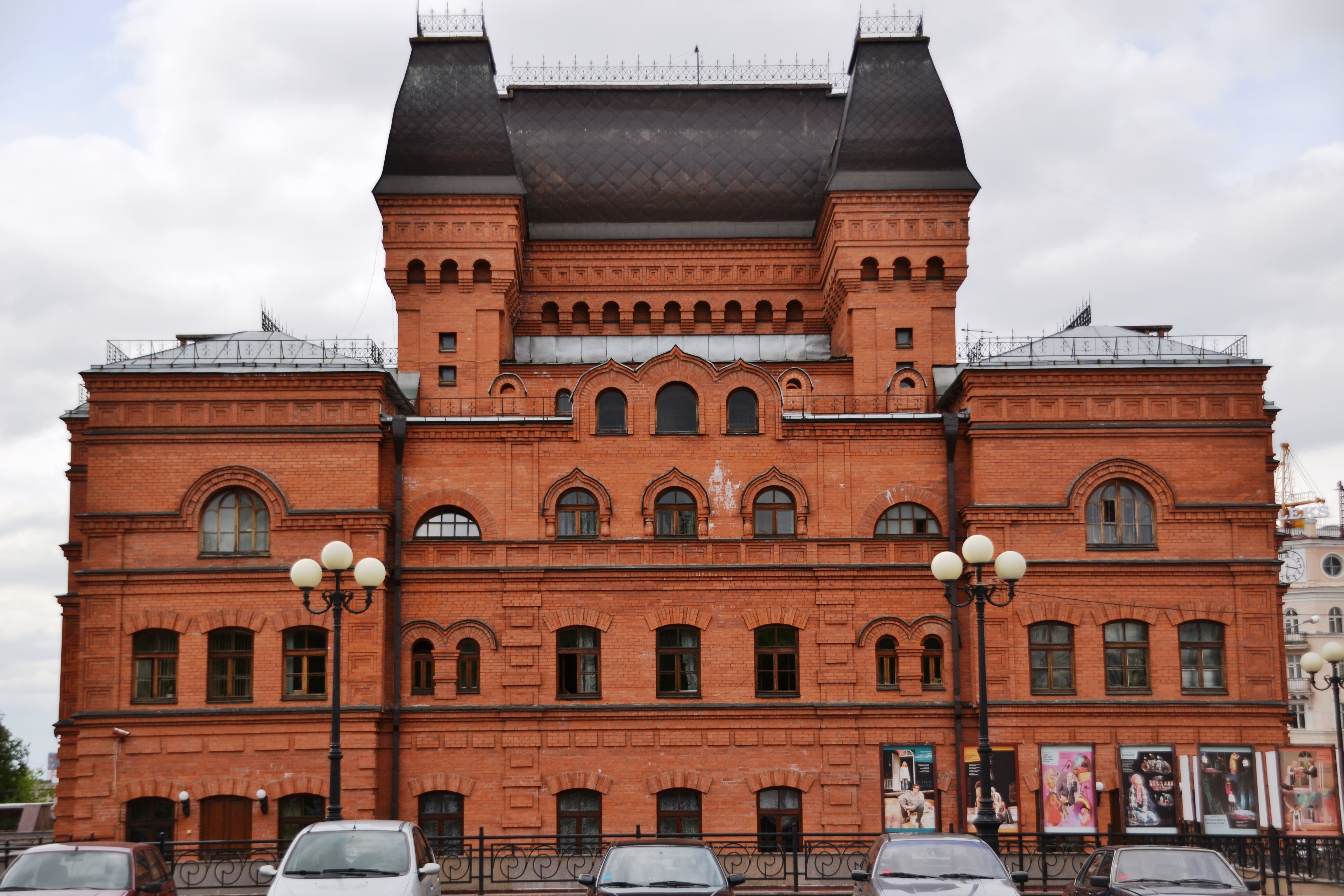 Беларуская (тарашкевіца): Будынак гарадзкога тэатра. г. Магілёў This is a photo of Belarusian heritage monument. Reference number: 513Г000585 ( WLM)